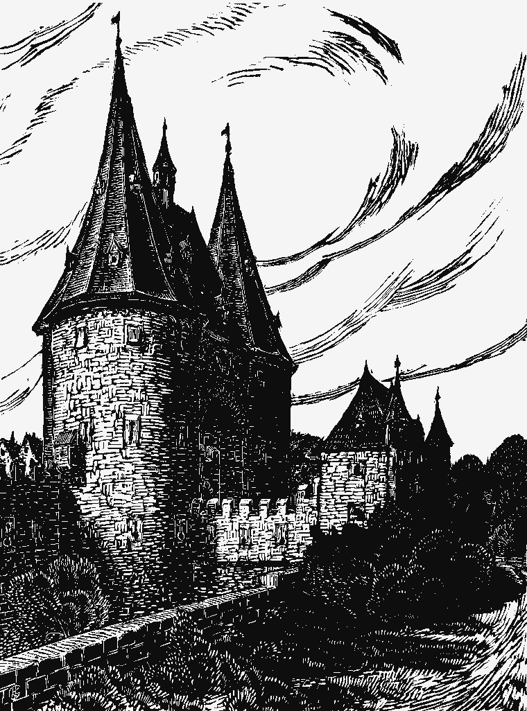 Kölntor, Aachen